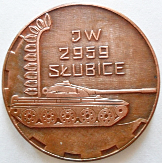 Medal pamiątkowy JW 2959